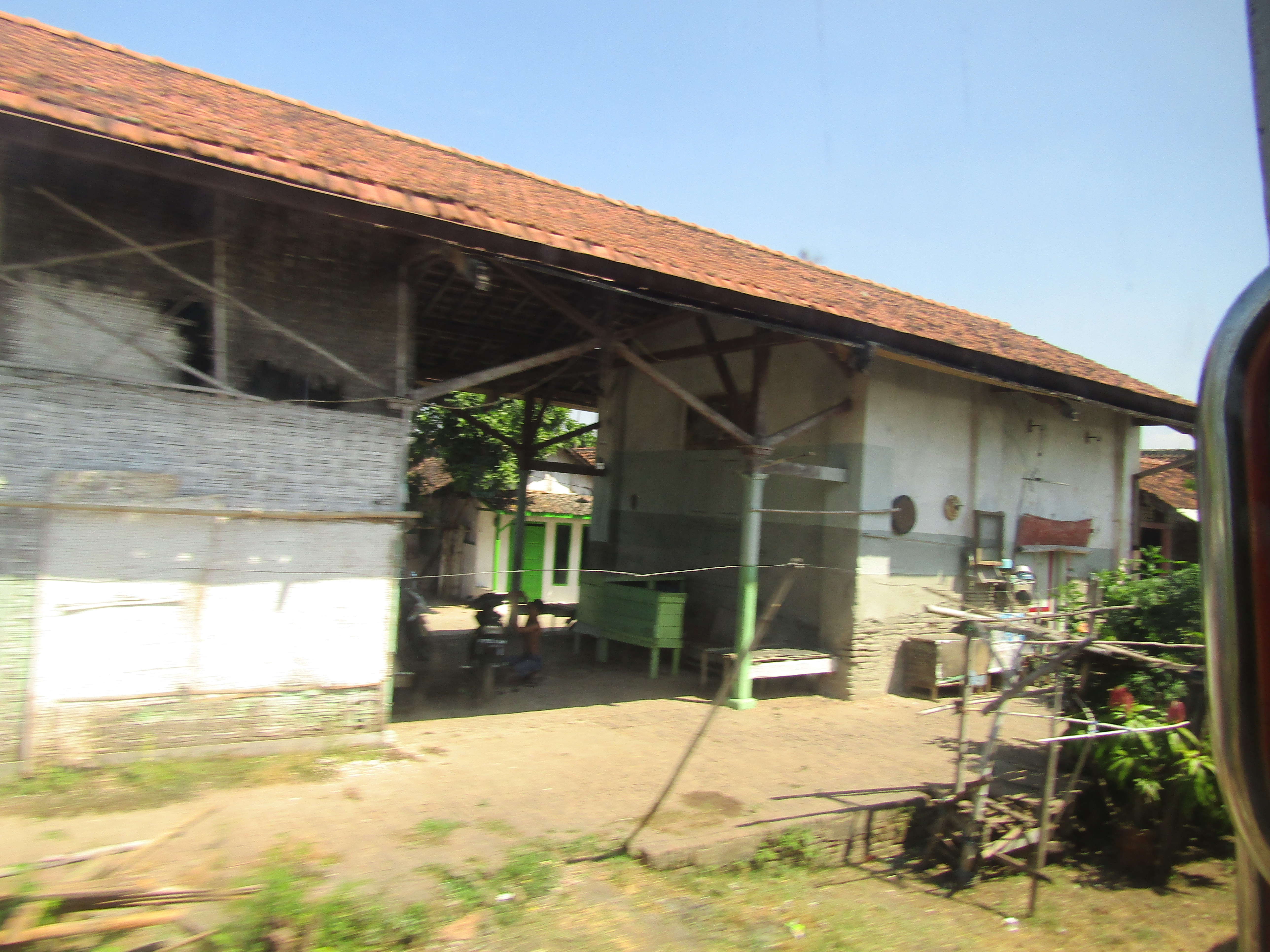 Bangunan utama Stasiun Kraton, 2019